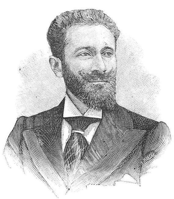 "Paul Escudier, vice-président du conseil municipal de Paris".